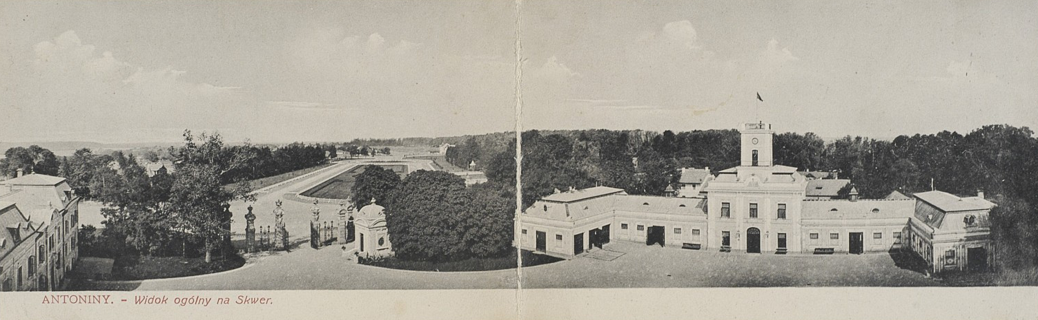 Накладом В. Кжишковського.